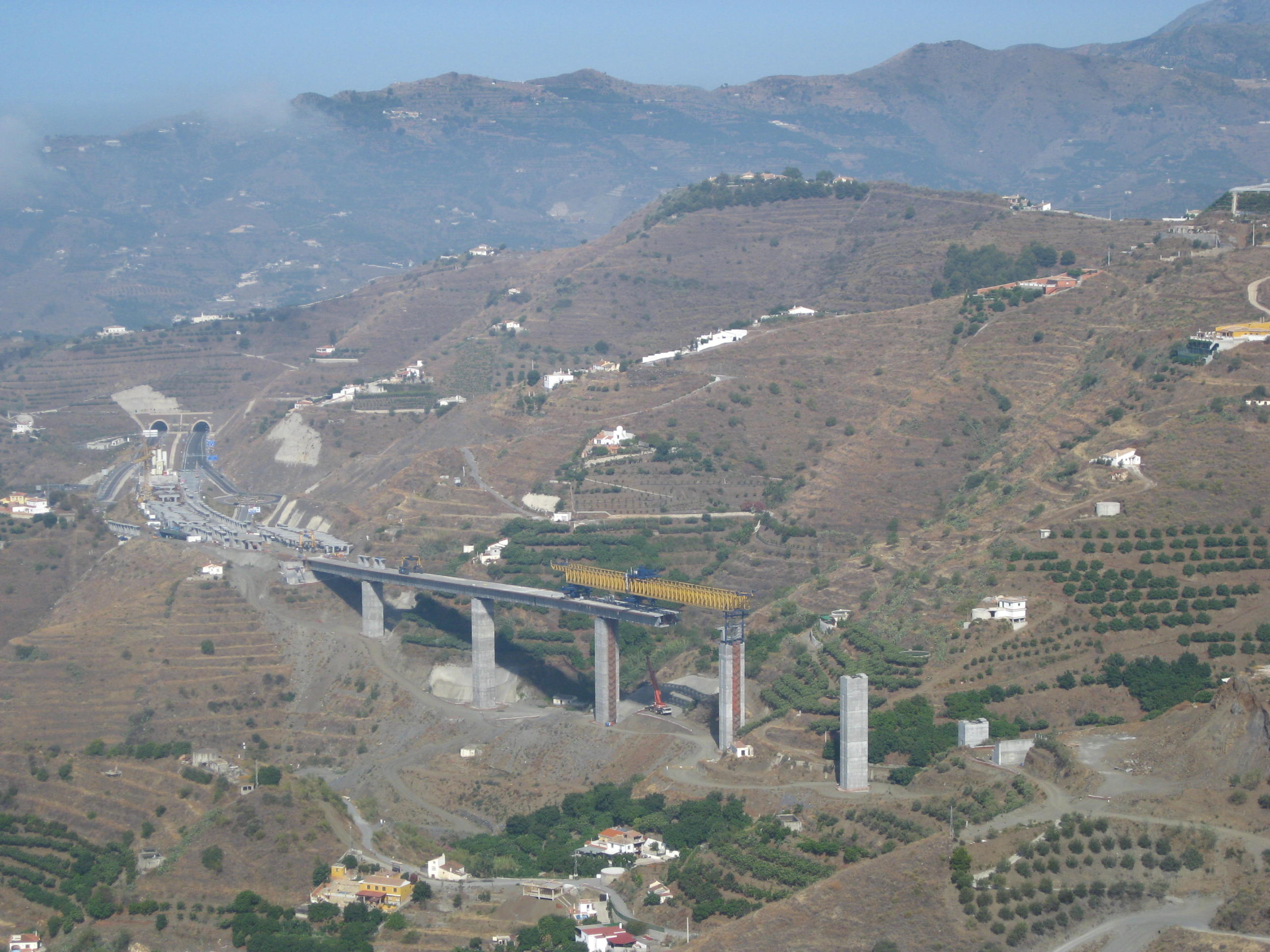 Taramay Viaducto